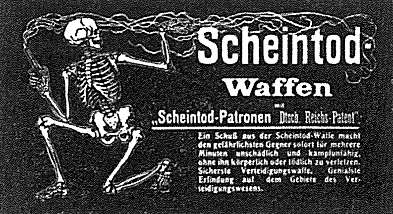 Werbung für "Scheintod-Waffen" (Schreckschuss- und Blend-Pistolen) aus: Stukenbrok Illustrierter Hauptkatalog 1912, Seite 220